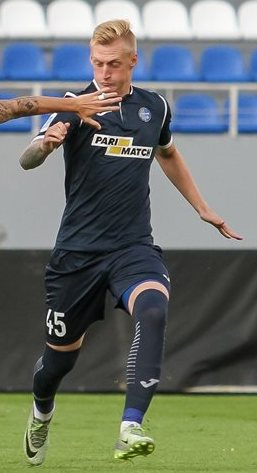 Владислав Хомутов - український футболіст Олімпіка (Донецьк)